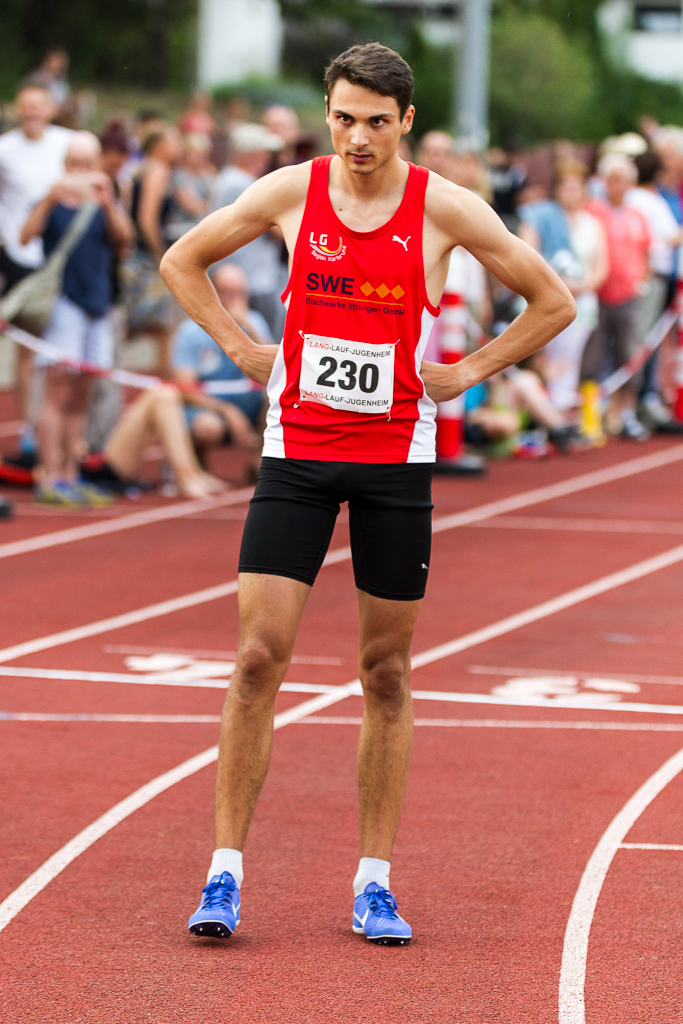 Laufgala des TSV Pfungstadt am 9. Juni 2018.